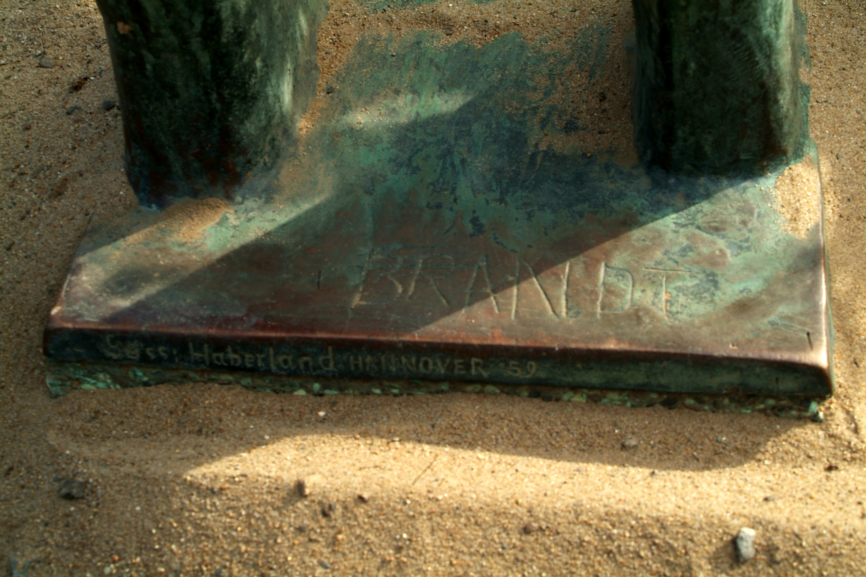 Signatur von Ewald Brandt und Inschrift / Gießermarke der 1959 von Haberland gegossenen und auf dem Schulhof der Grundschule/Volksschule (heute: Albert-Dürer-Schule) in Hannover aufgestellten Skulptur Bockspringen.